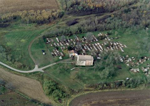 Egyházasdengeleg, Hungary, aerialphotography